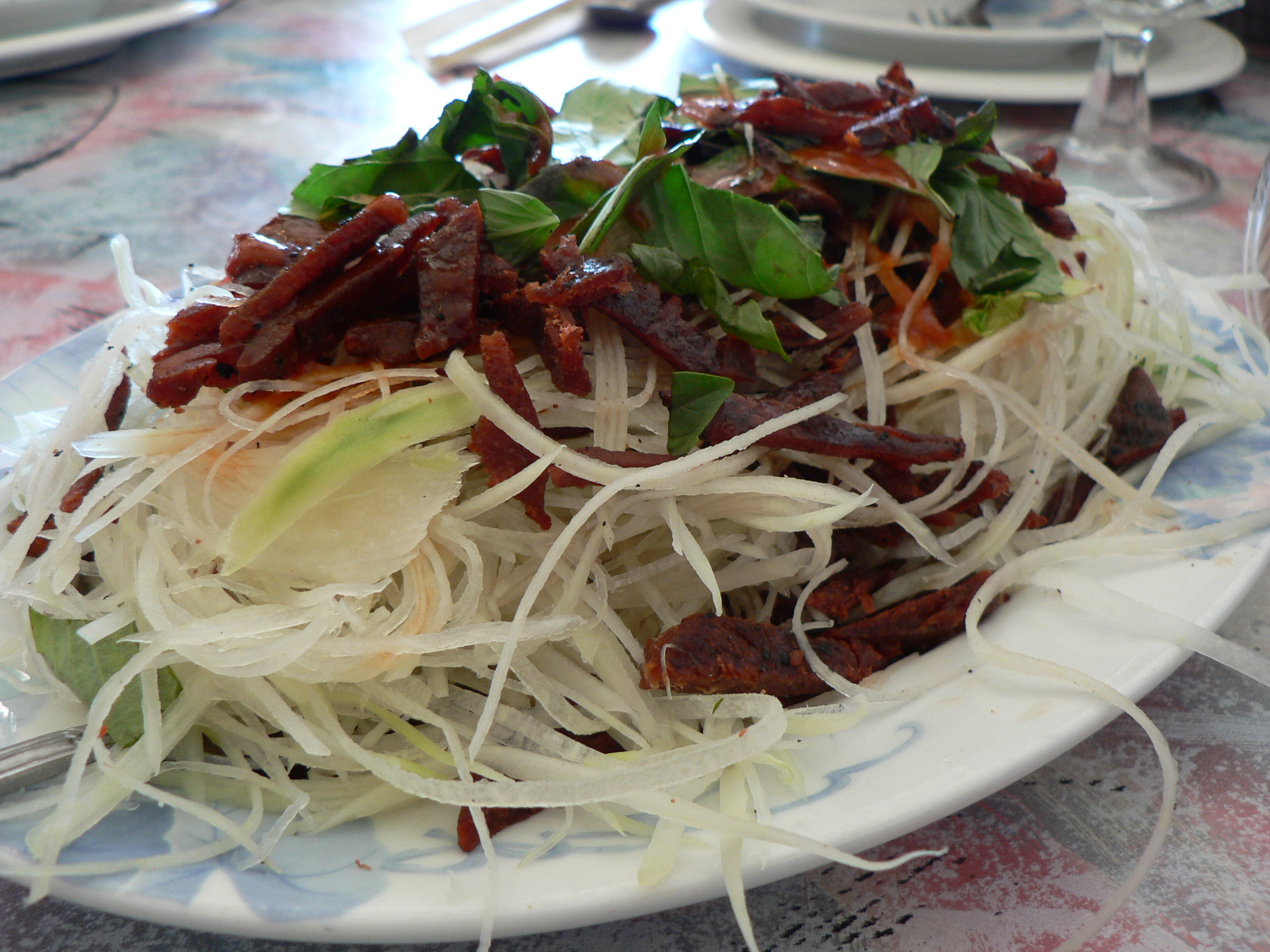 Beef papaya salad.